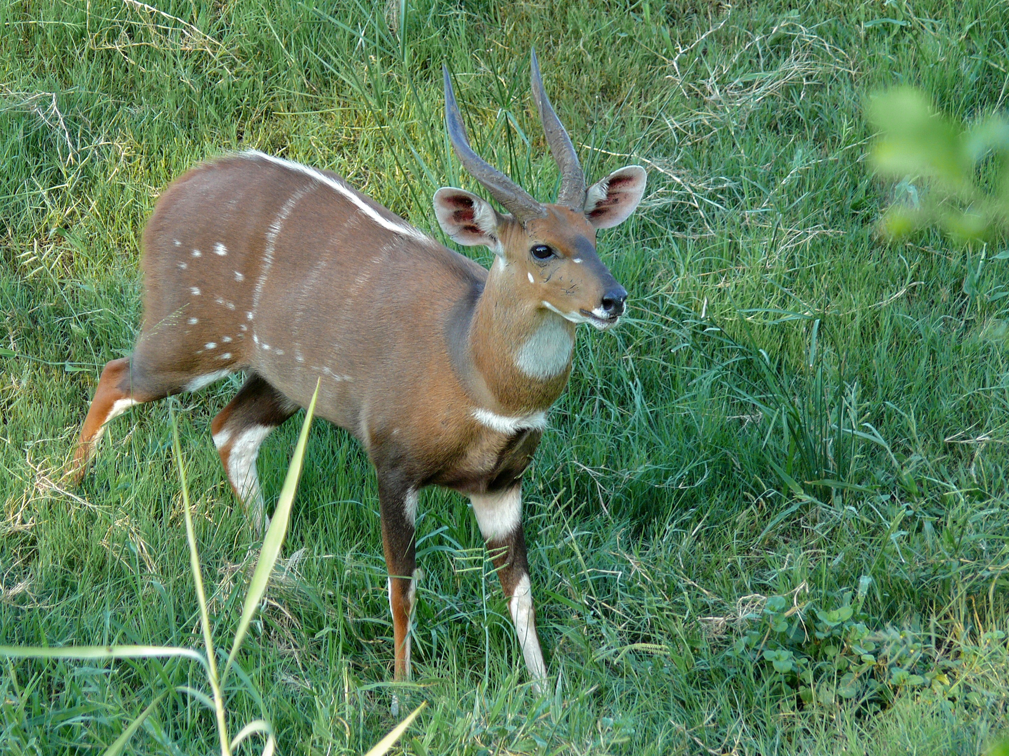 Bushbuck male near Letaba Camp, Kruger NP, SOUTH AFRICA